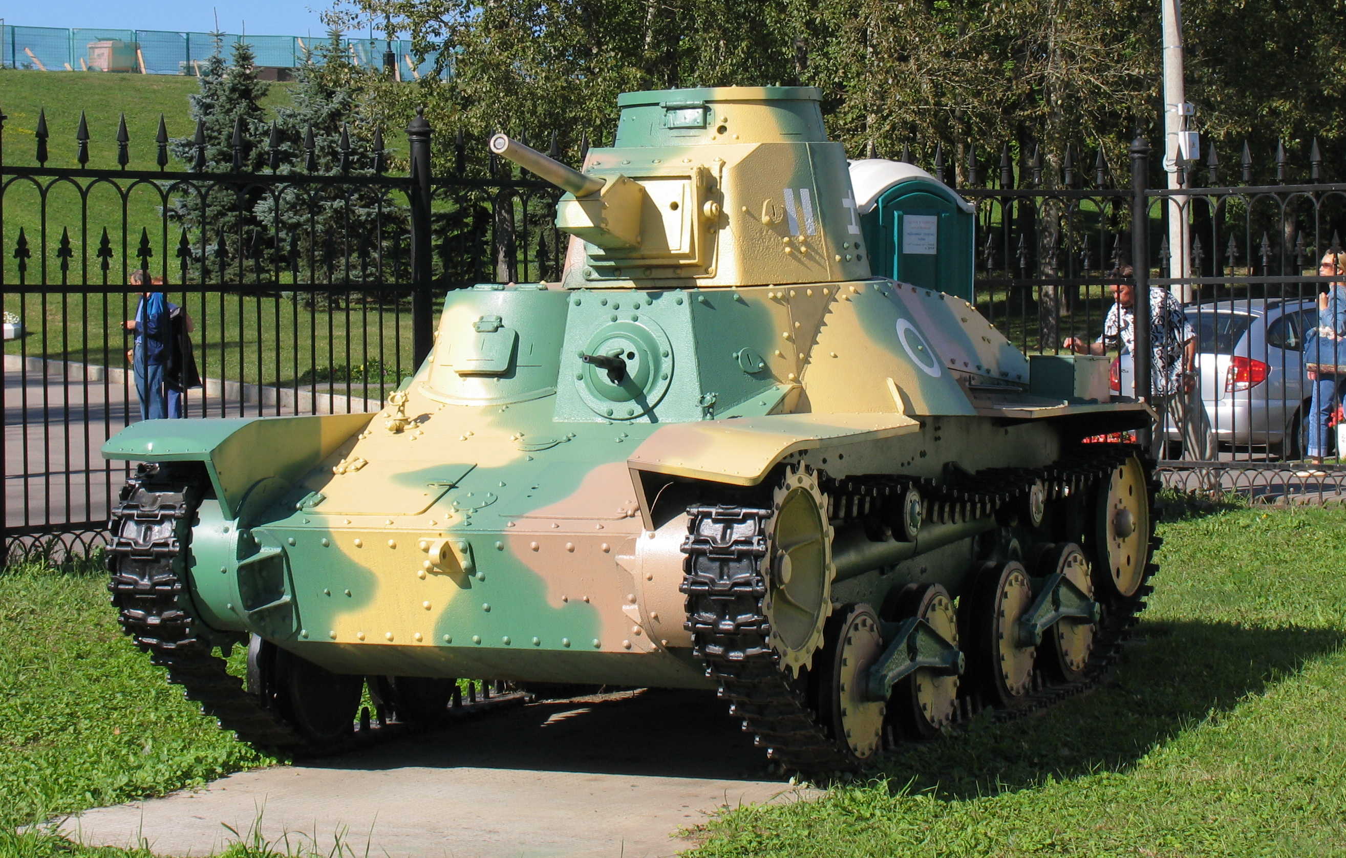 Ha-Go Moscow